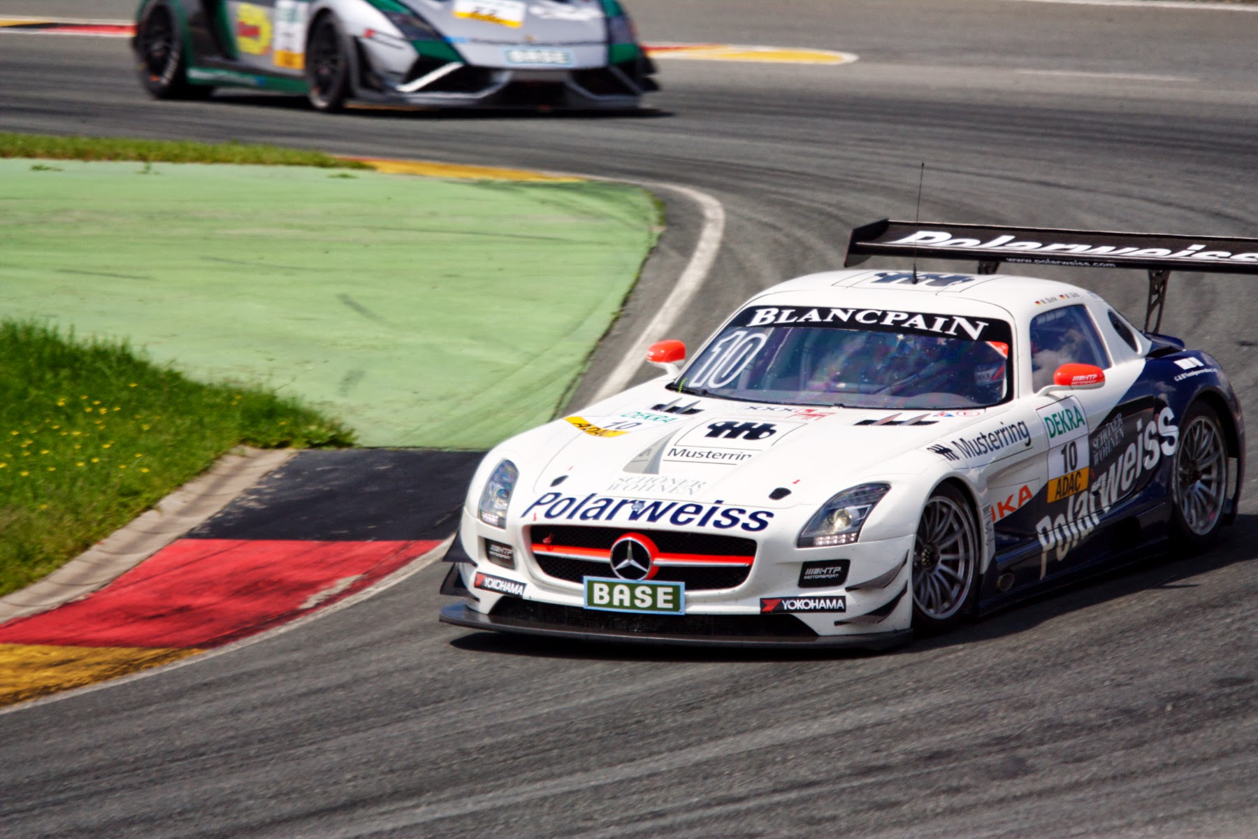 Maximilian Götz fährt einen Mercedes-Benz SLS AMG GT3 beim Samstagsrennen des ADAC GT Masters auf dem Sachsenring 2013